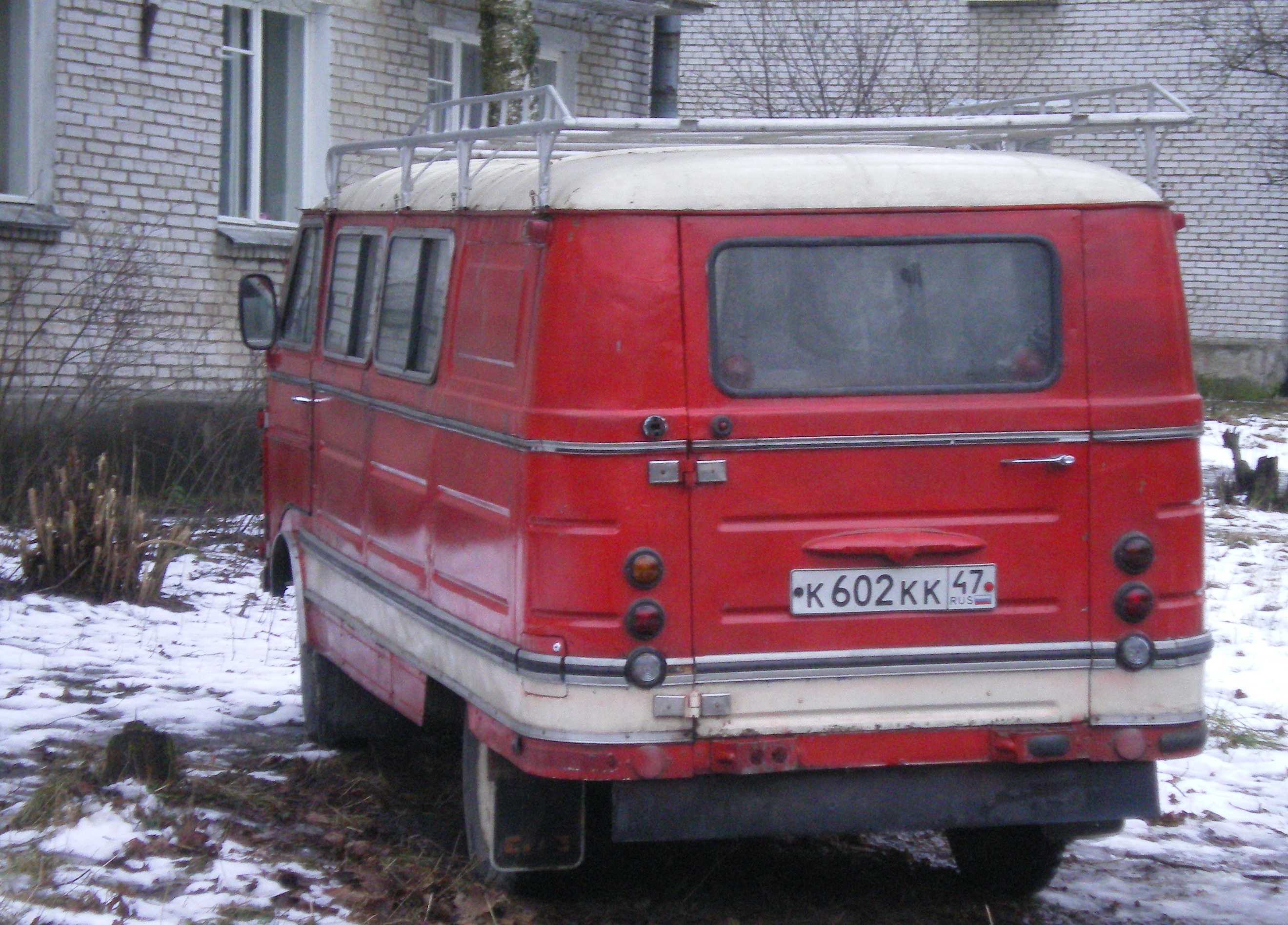 RAF-977 сзади